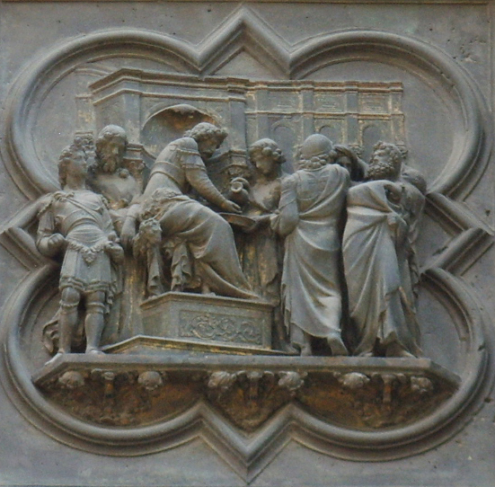 6 Gesù dinanzi a Pilato6